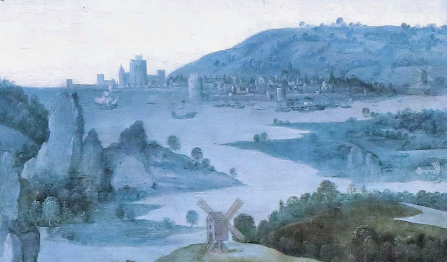 Joachim Patinier, Repos pendant la fuite en Egypte (1480-1524), detail 1.